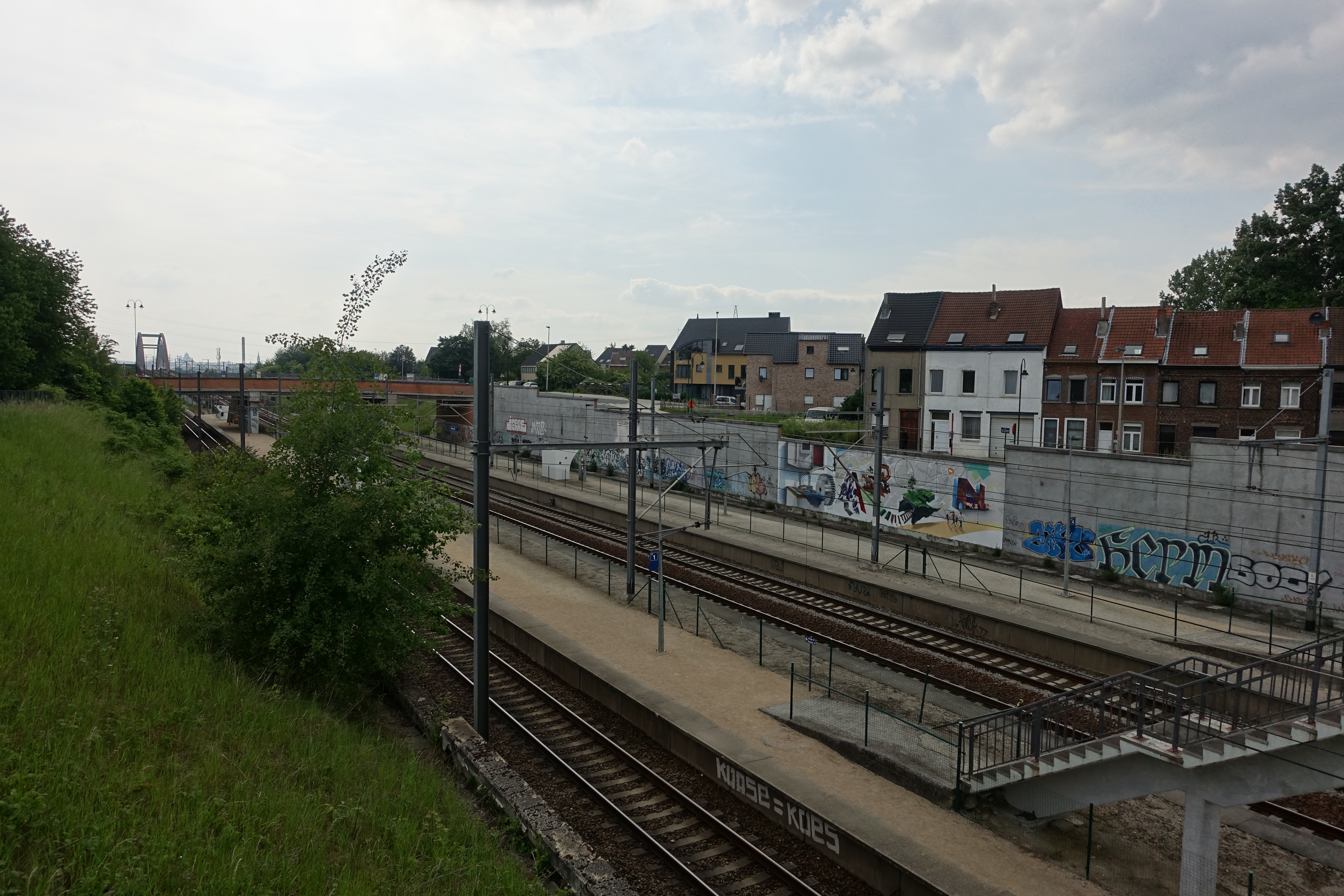 Station Haren-Zuid gezien vanuit de Moestuinstraat